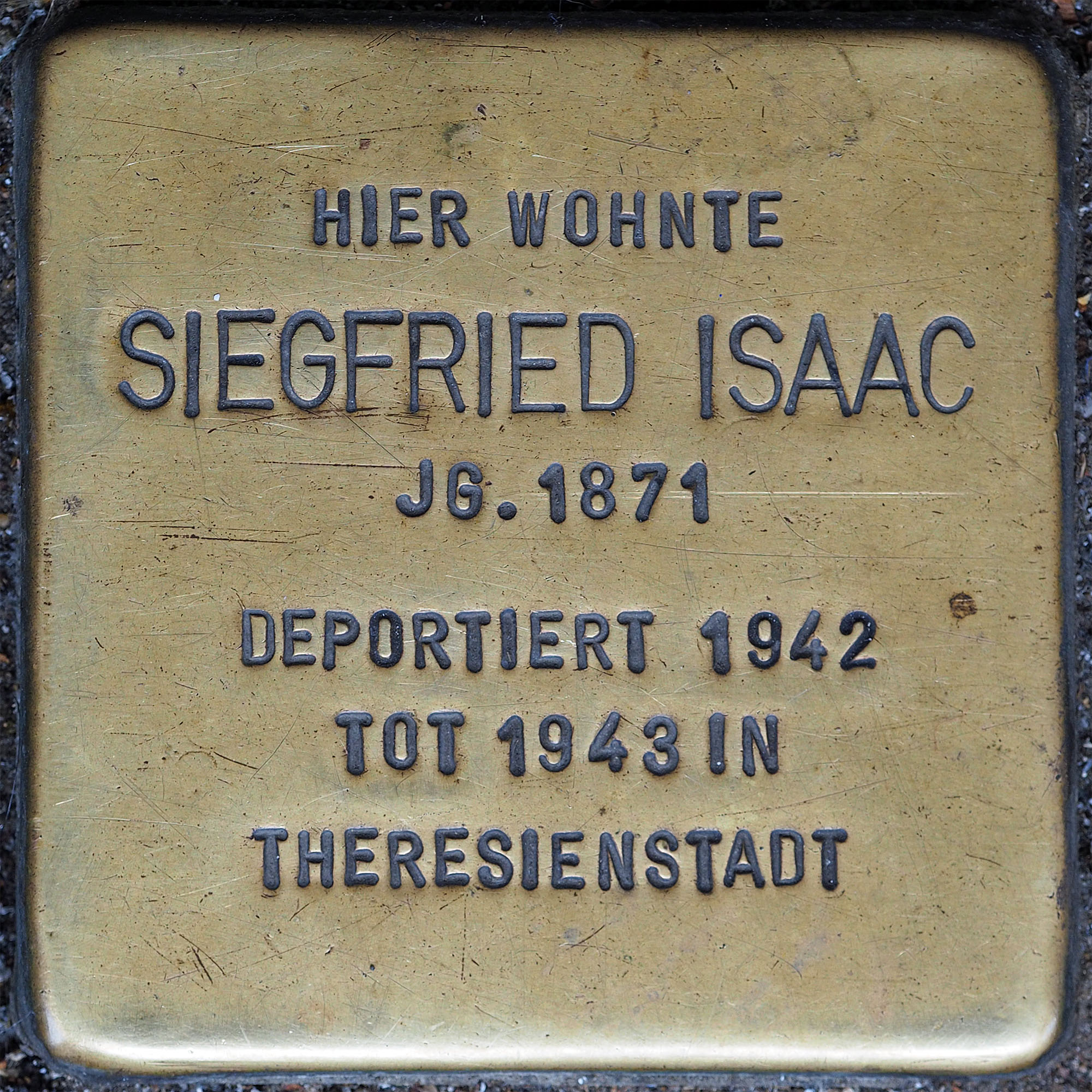 Stolpersteine MG: Isaac, Siegfried